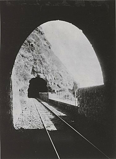 Sortie du tunner ferroviaire — Saint-Denis, Réunion